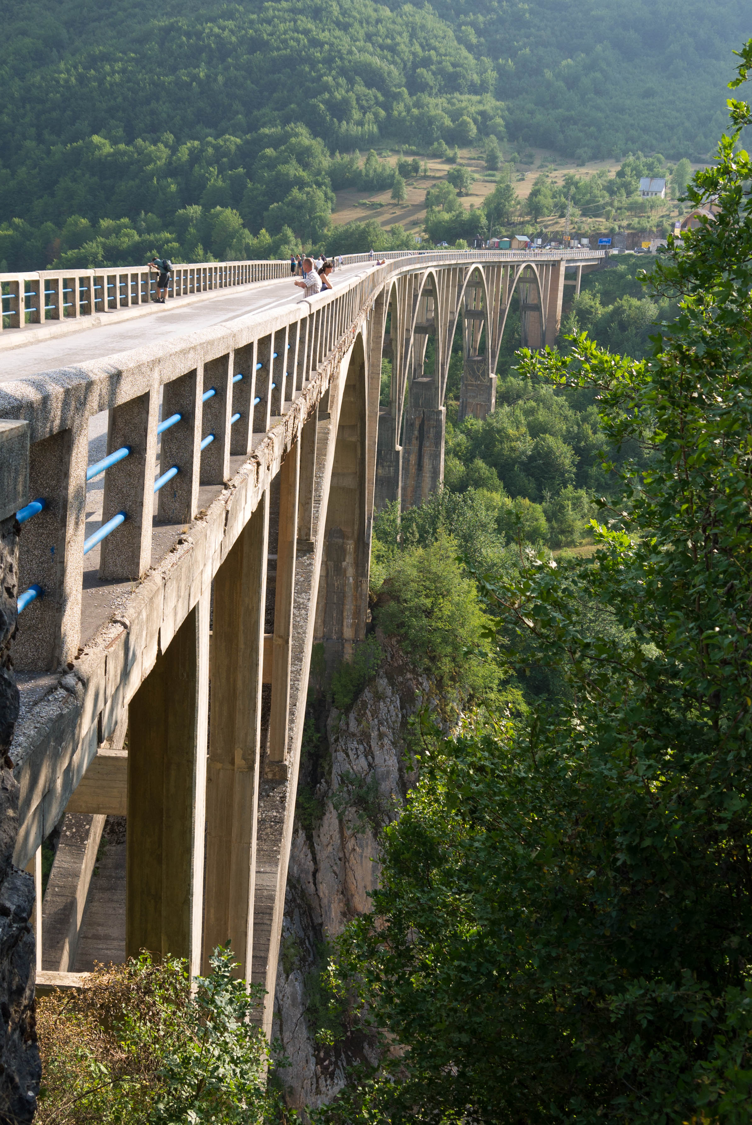 Мост через каньон реки Тара